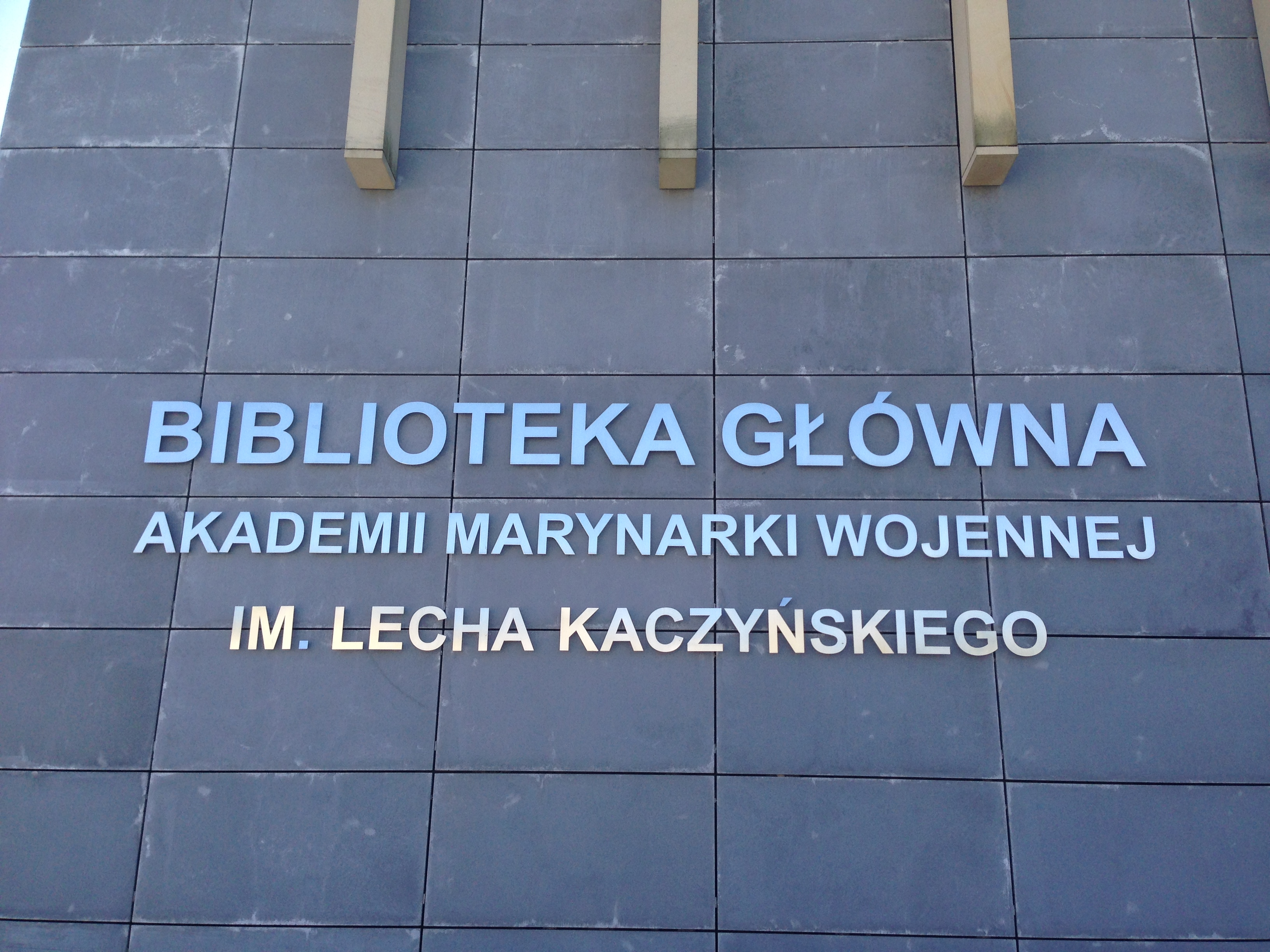 Napis na budynku Biblioteki Głównej Akademii Marynarki Wojennej informujący o jej patronie prezydencie Lechu Kaczyńskim